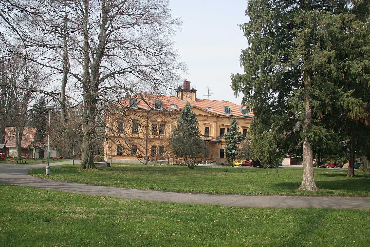 zámek v obci Přestavlky, district Chrudim autor: Prazak date: 20. 4. 2006